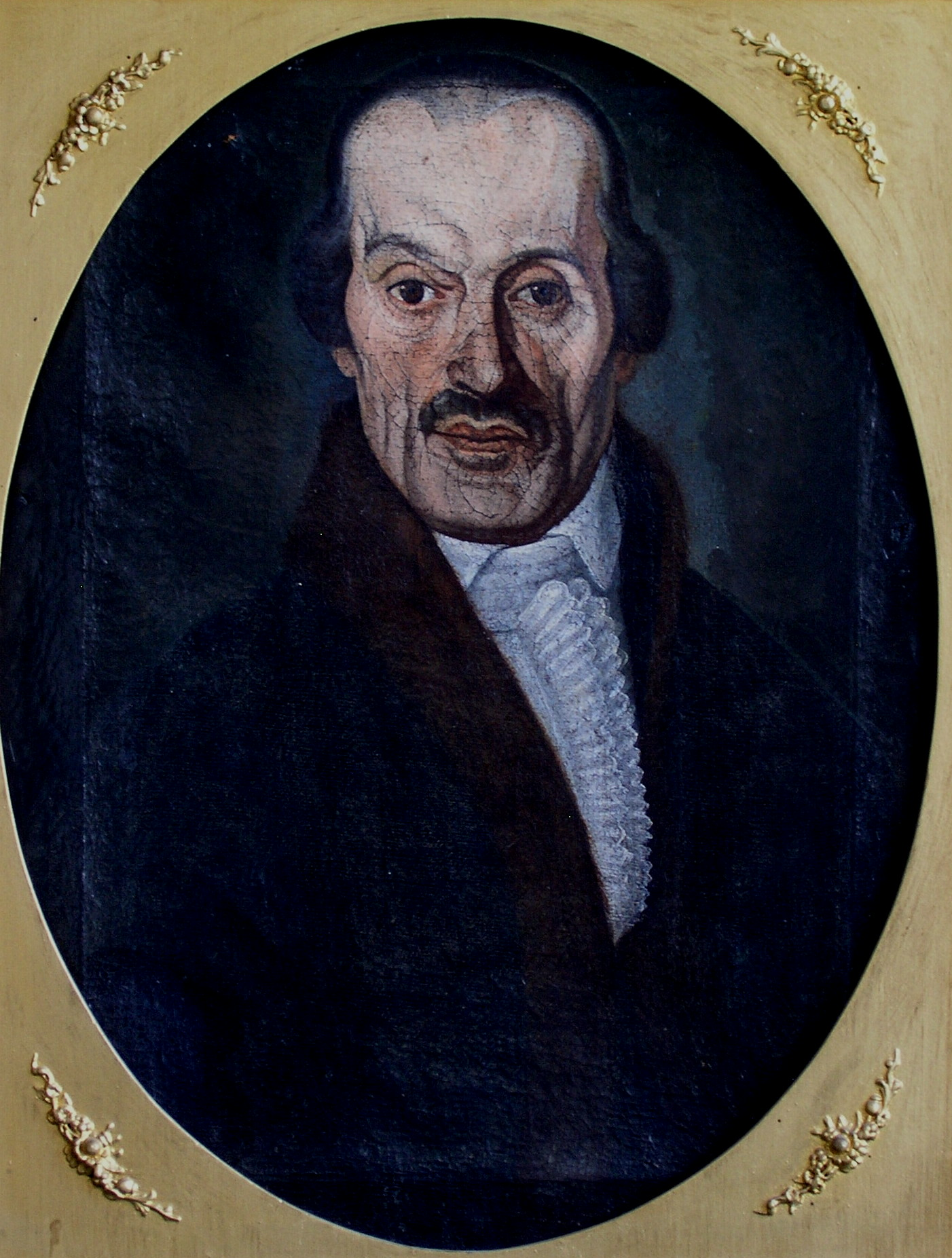 Cházár András a váci siketnéma intézet alapításának kezdeményezője, ügyvéd, megyei főjegyző.